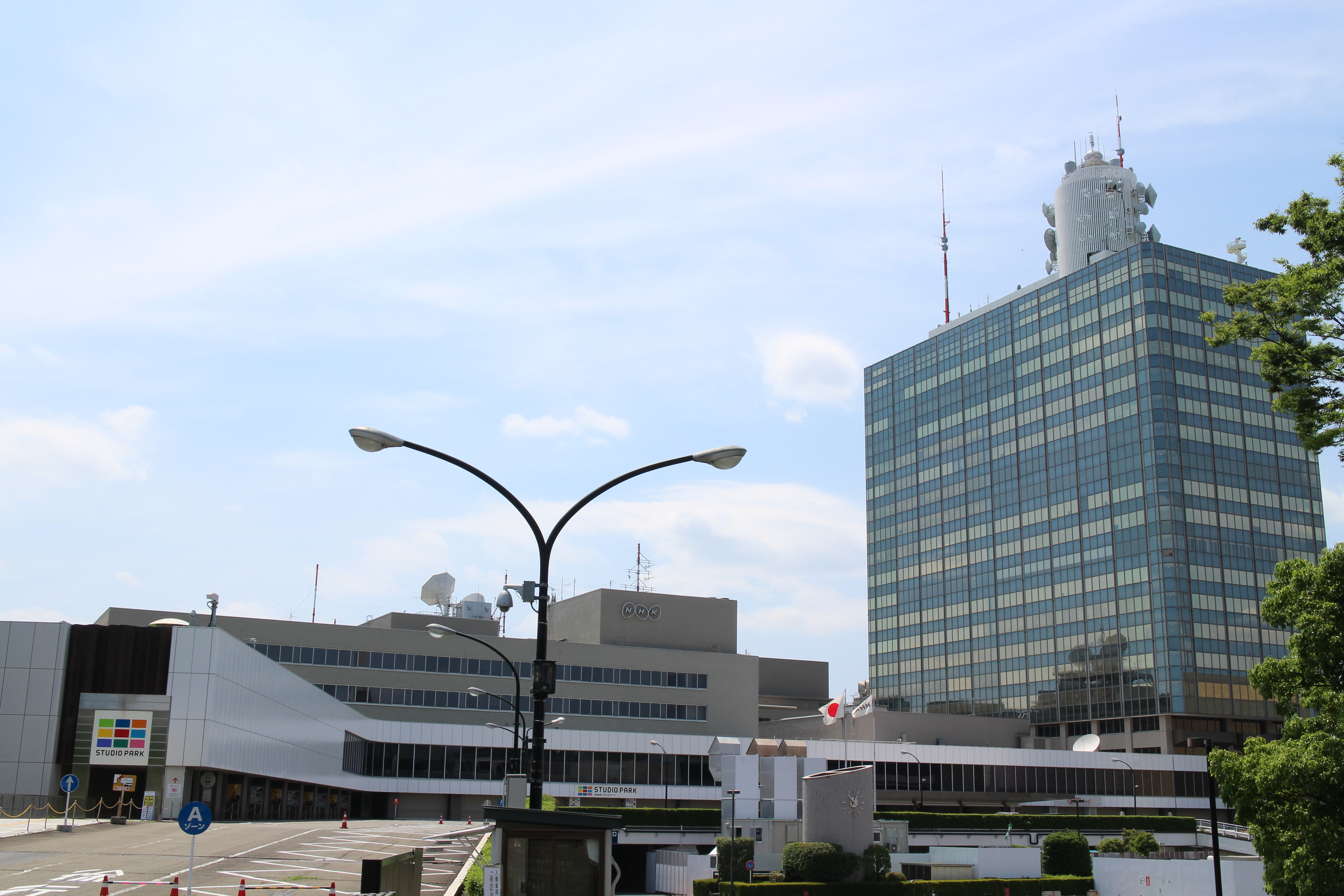 NHK放送センター